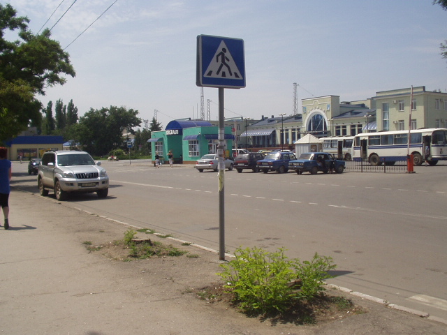 Крым. г.Джанкой. Площадь у железнодорожного вокзала